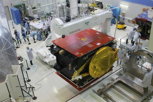 El satelite ARSAT-1 en sus ultimos dias en INVAP. El satélite es ingresado a la base del contenedor, que posee un sistema de resortes para aislar las vibraciones durante el transporte.